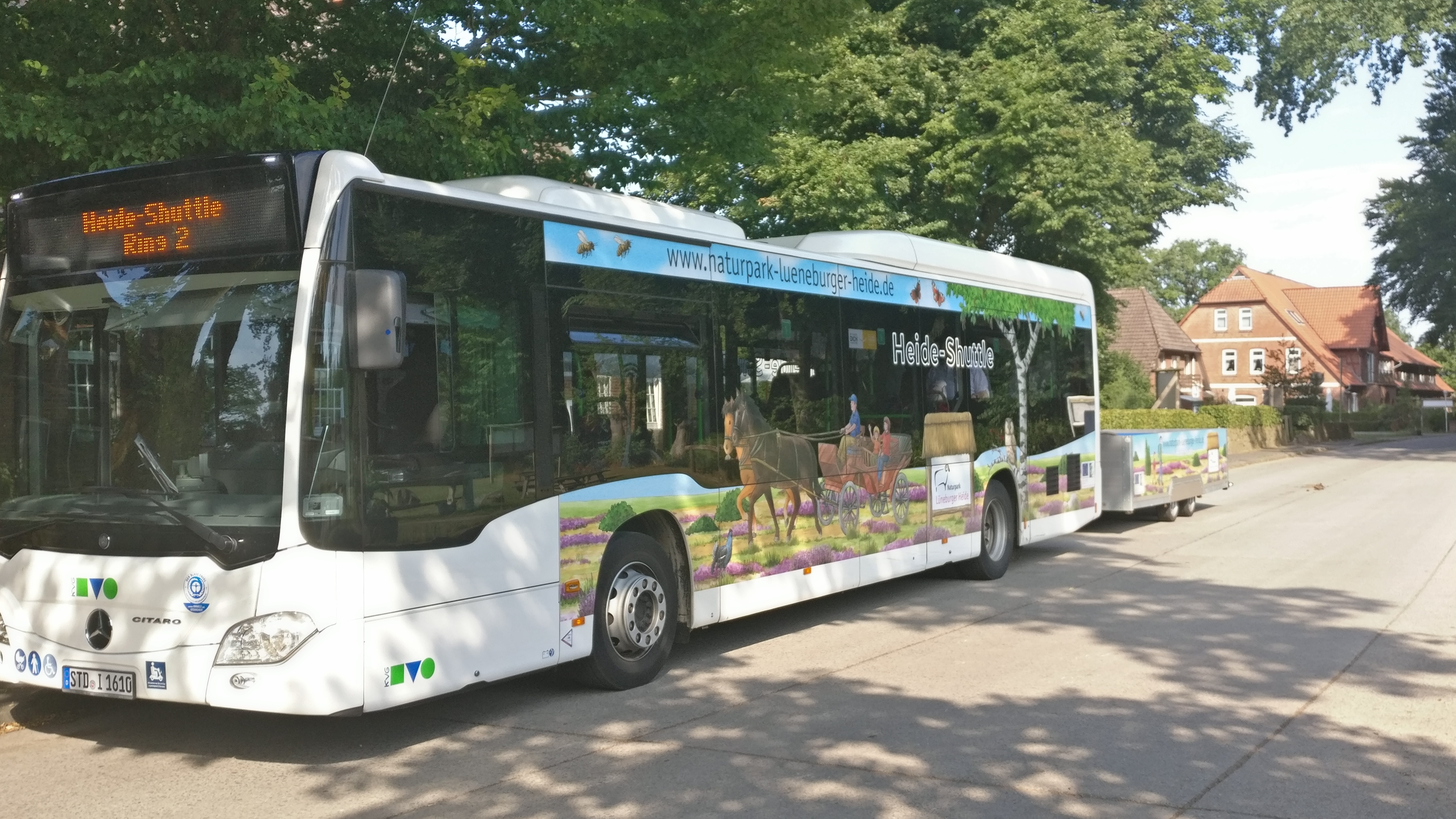 Der Heide-Shuttle zieht zwischen dem 15.Juli und dem 15.Oktober seine Kreise durch den Naturpark